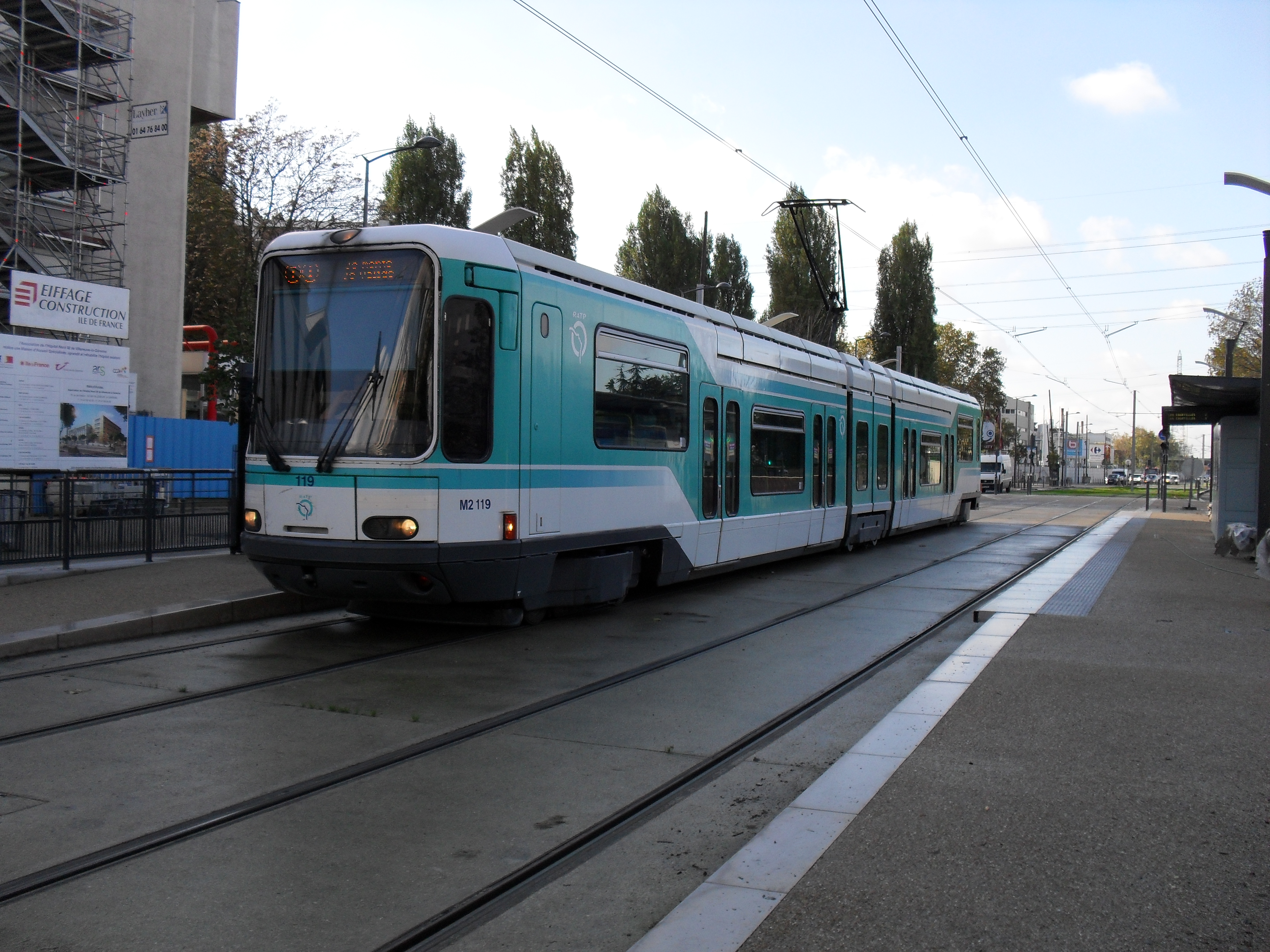 Paris Tramway ligne 1